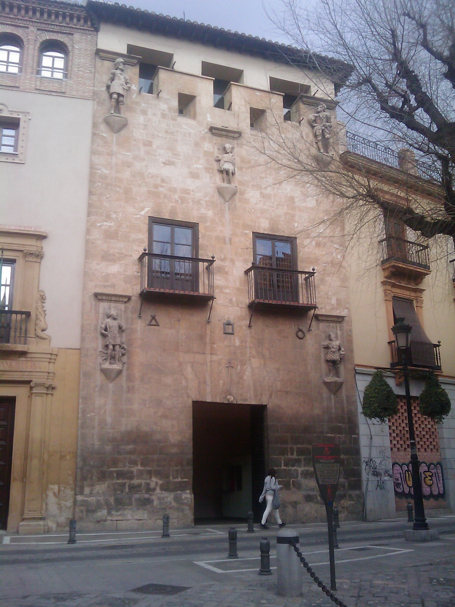 Fachada del Museo Casa de los Tiros, Granada, España